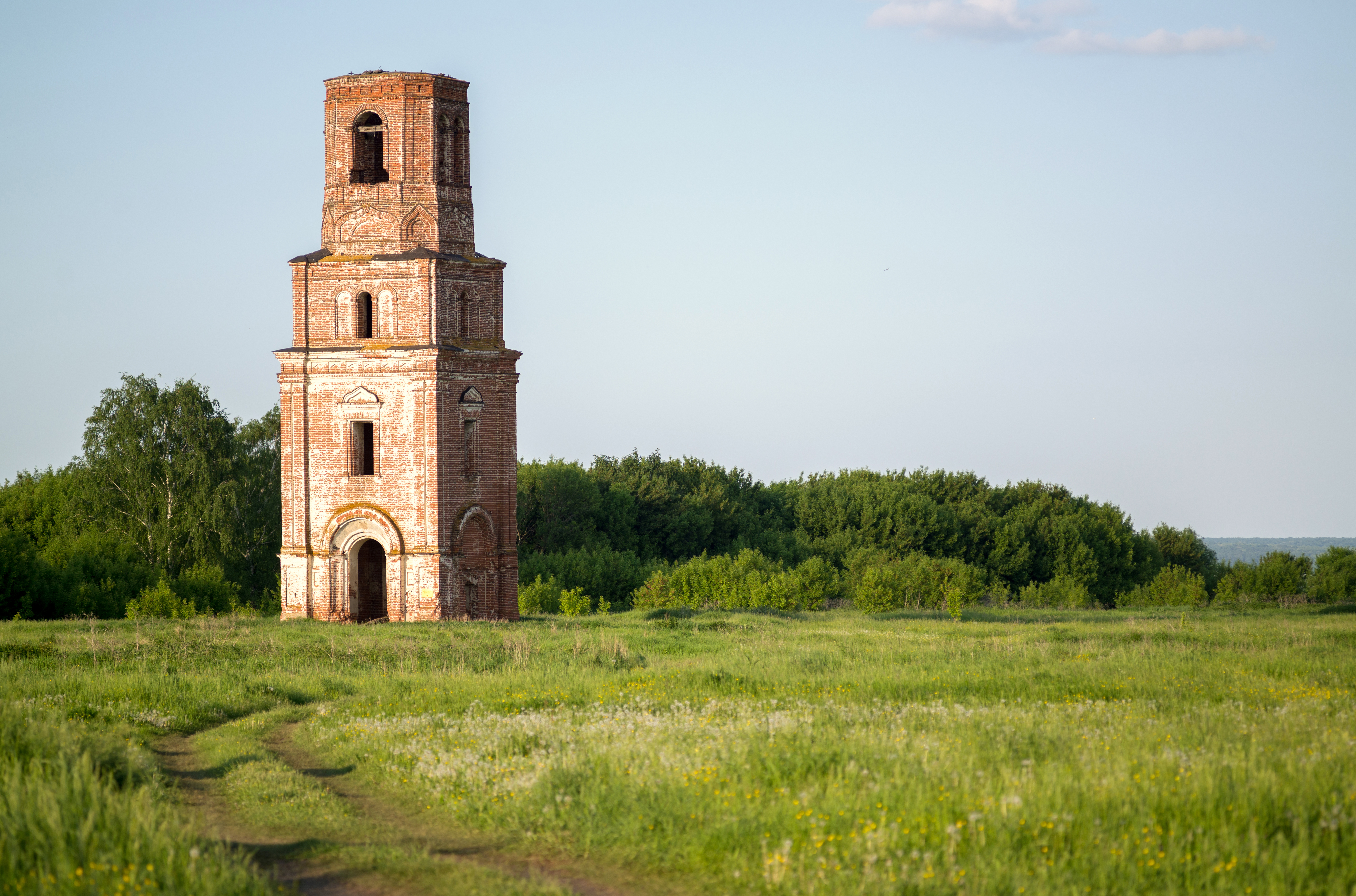 Колокольня церкви Святой Троицы: Рождествено, Лаишевский район, Татарстан